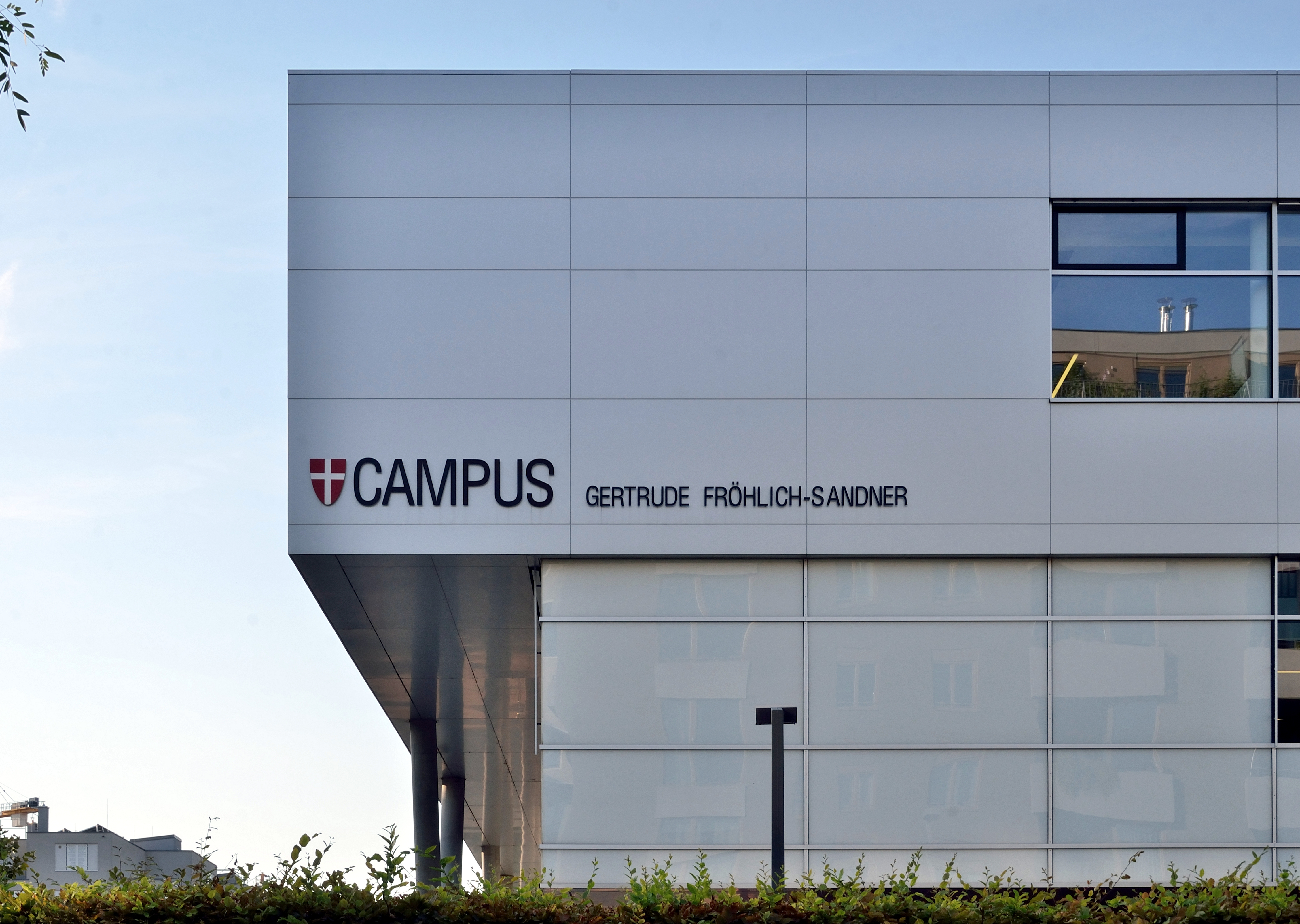 Die Schule Campus Gertrude Fröhlich-Sandner in der Ernst-Melchior-Straße in der Wiener Leopoldstadt.